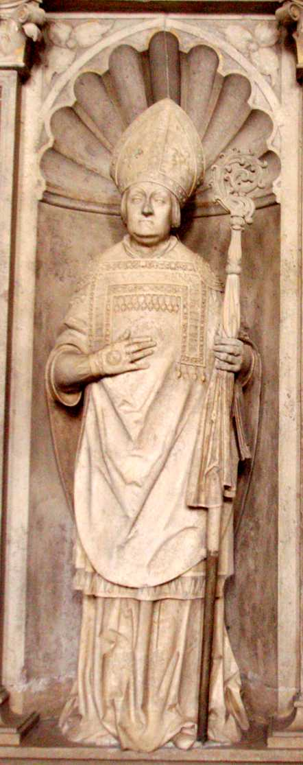 Grabdenkmal Bischofs Gabriel von Eyb im Eichstätter Dom